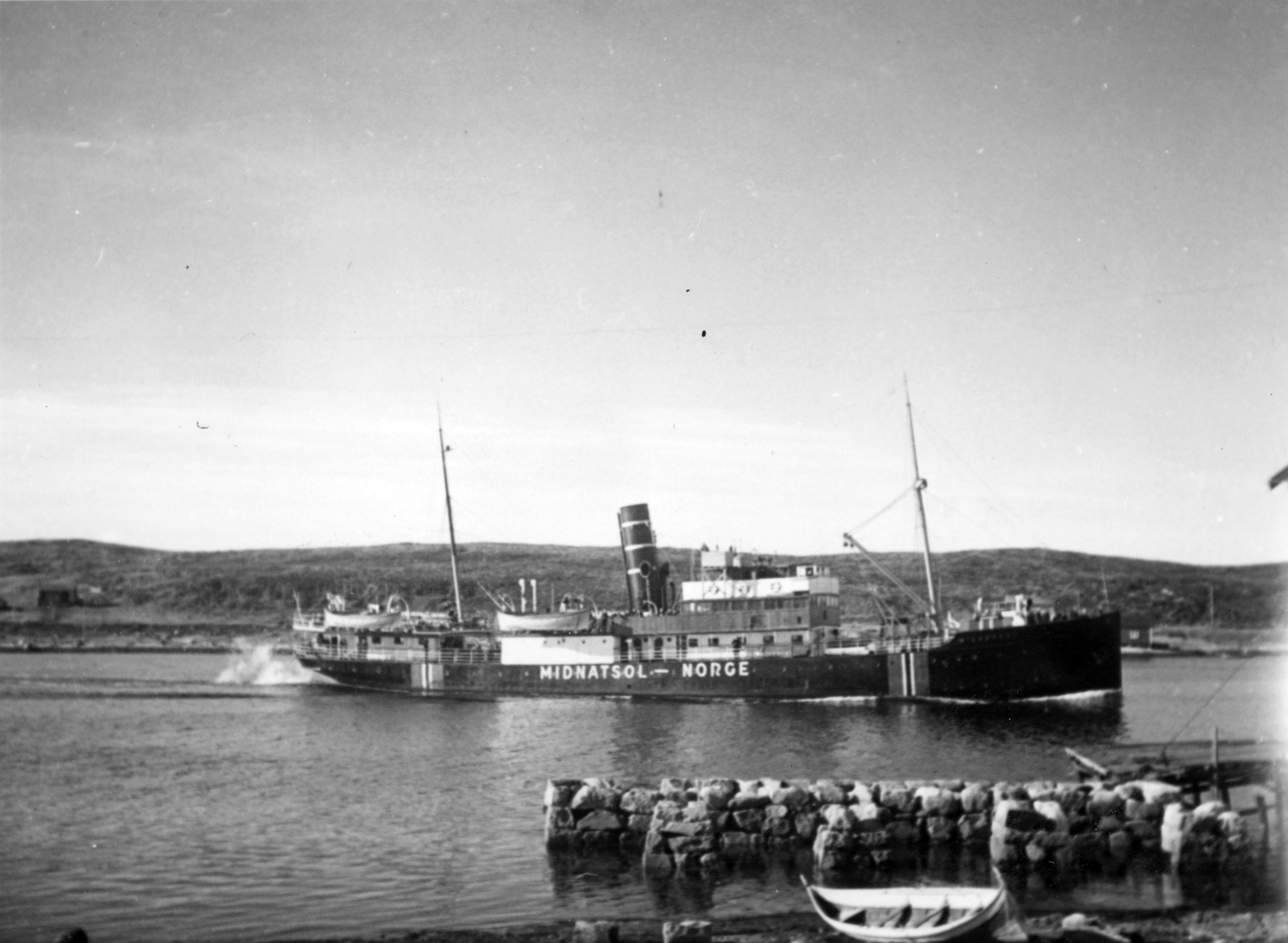 Tittel / Title: Bilde 14 Dato / Date: Fotograf / Photographer: Franz Affolderbach Utgiver / Publisher: Sted / Place: Brønnøysund, Nordland Eier / Owner Institution: Arkiv i Nordland Lenke / Link: Arkiv i Nordland Arkivreferanse /Archive reference: AIN.NA143.0479 Fra [#//snl.no/.nbl_biografi/Dag_Skogheim/utdypning Dag Skogheims] Privatarkiv Tekst til bildet: D/S Midnatsol. Det Bergenske Dampskipsselskap.